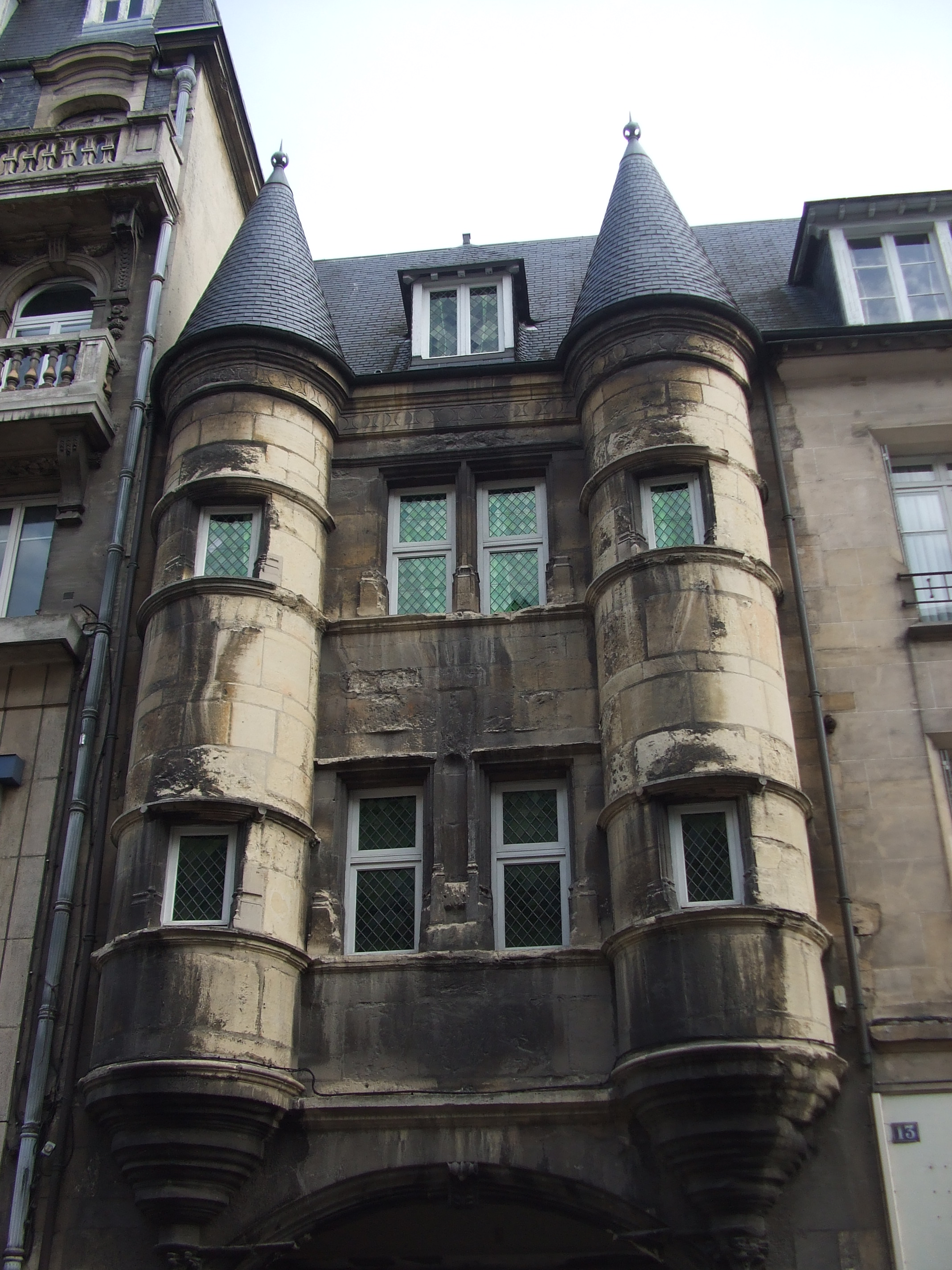 porte du chapitre à Reims